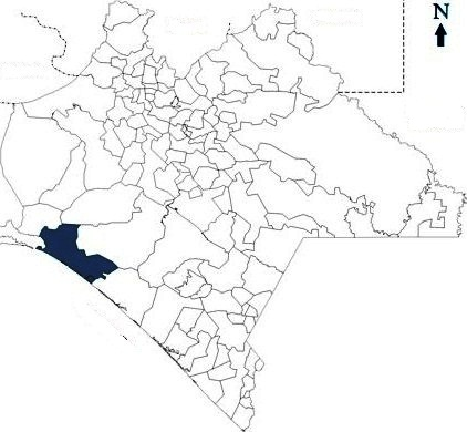 Muncipio de Tonalá - Ubicación en Chiapas - México